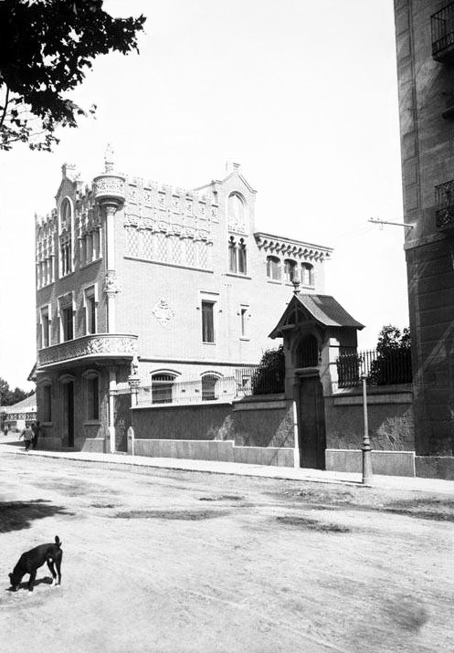 Imatge